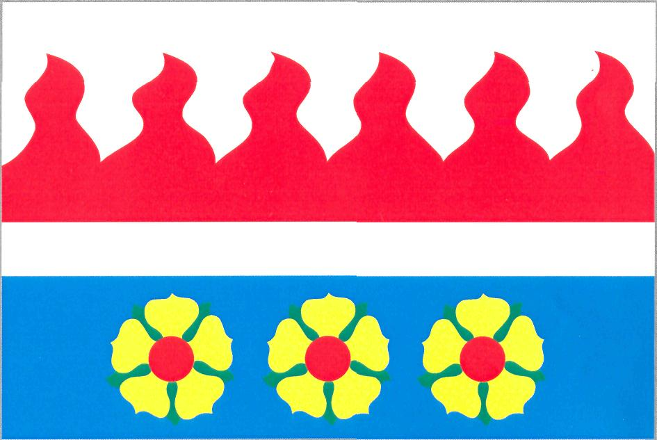 Vlajka obce Žďár nad Metují